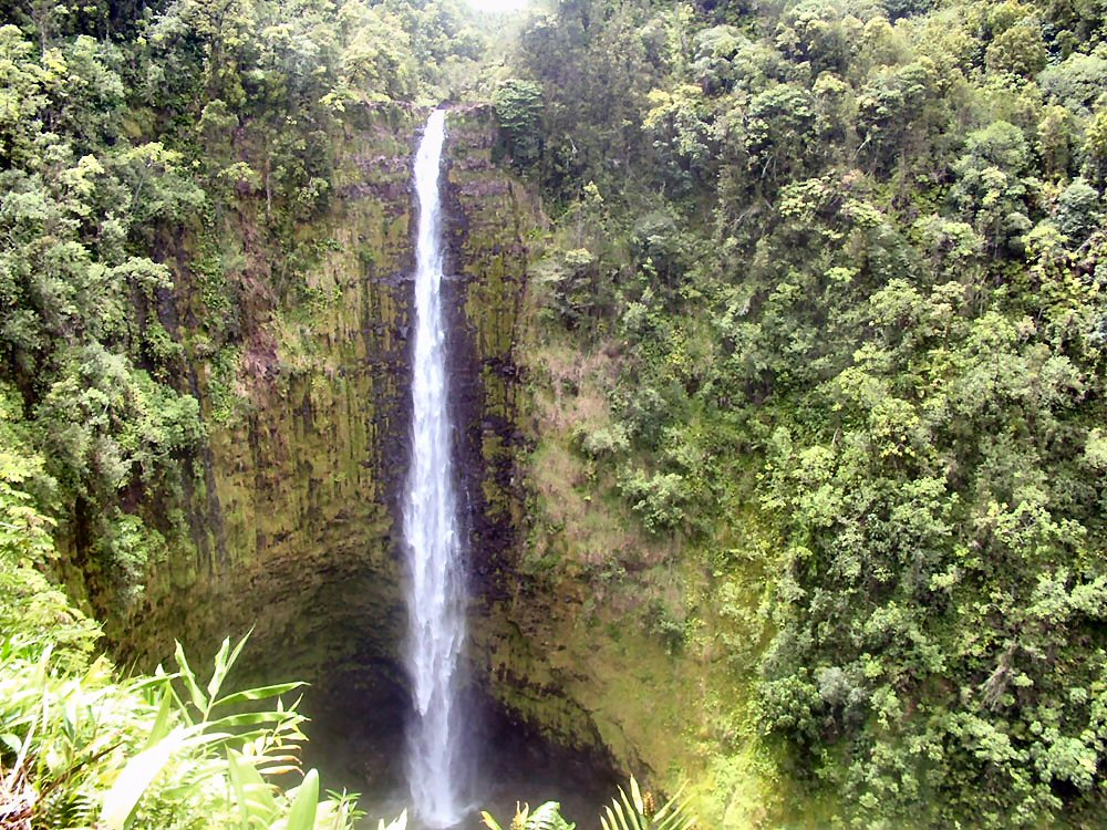 Akaka vandfaldet på øen Hawaii.